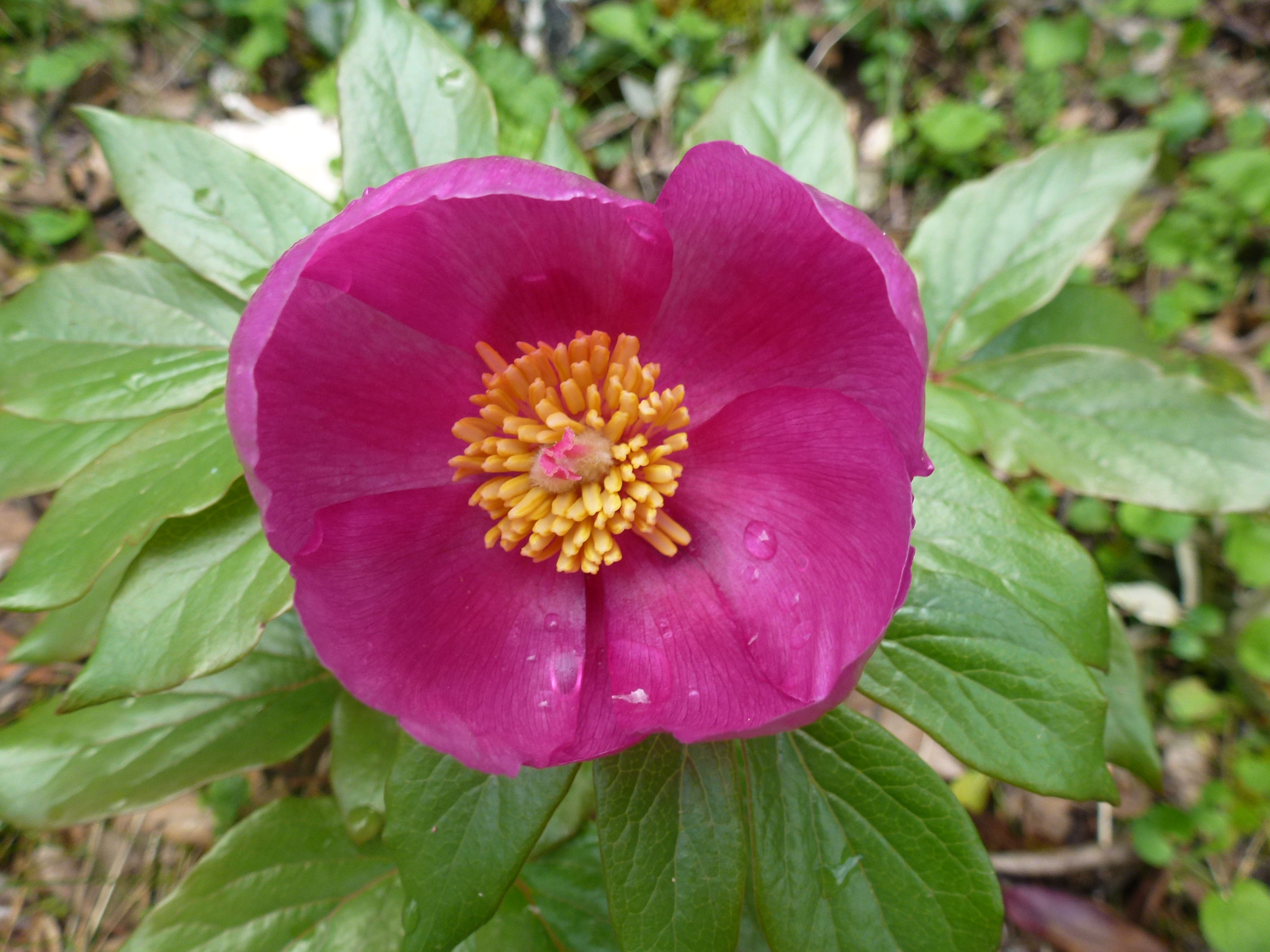 Η παιώνια στον Εθνικό Δρυμό Αίνου